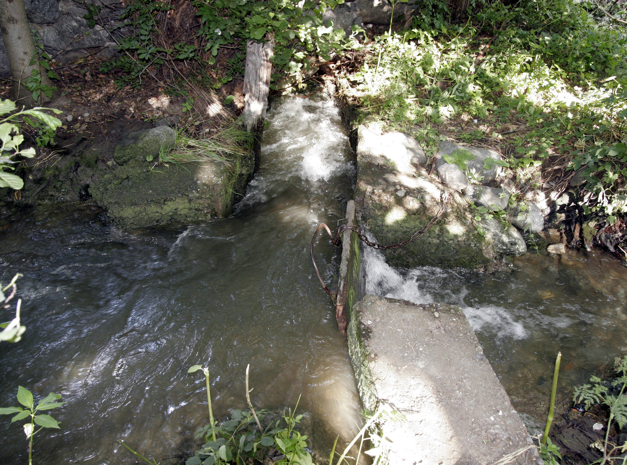 ein Waal in Laatsch (Südtirol), in der Nähe der Etsch, mit einem einfachen Brett als Wehr zum Umleiten des Wassers